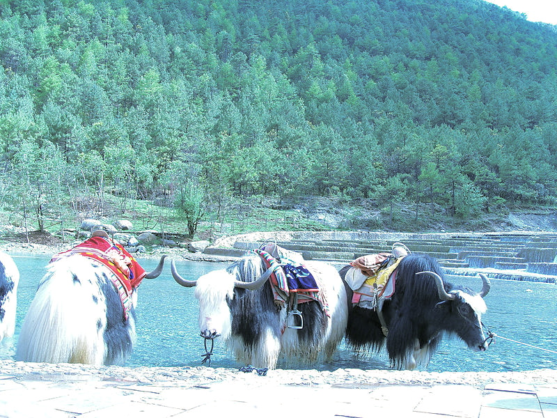 Yunnan Yaks